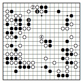 第7期本因坊戦挑戦手合七番勝負第4局 1952年8月6-7日 本因坊昭宇(先番)-高川格 93-96手目